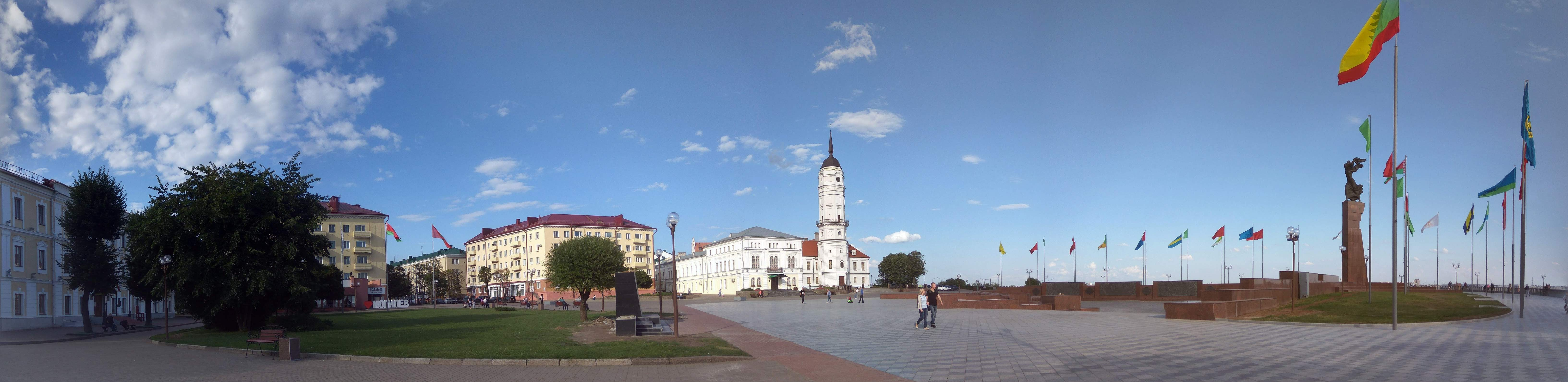 Магілёў. Панарама плошчы Славы